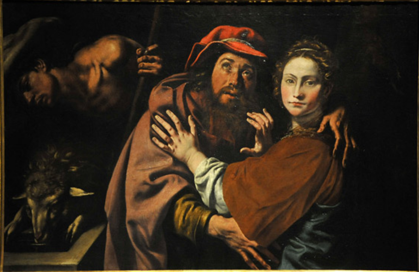 Giacobbe e Racheletitle QS:P1476,it:"Giacobbe e Rachele" label QS:Lit,"Giacobbe e Rachele"